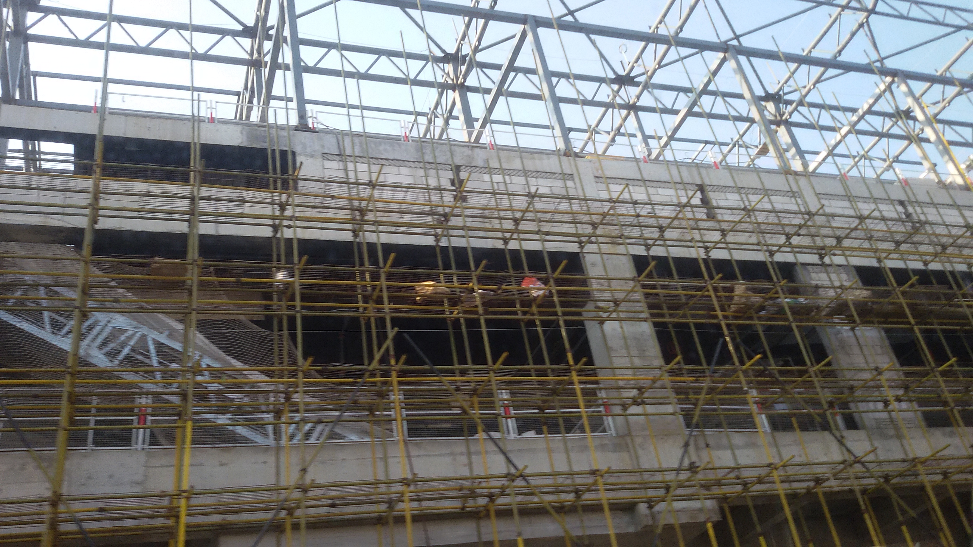 粵語: 2017年12月31號，竹料站重喺度起緊。